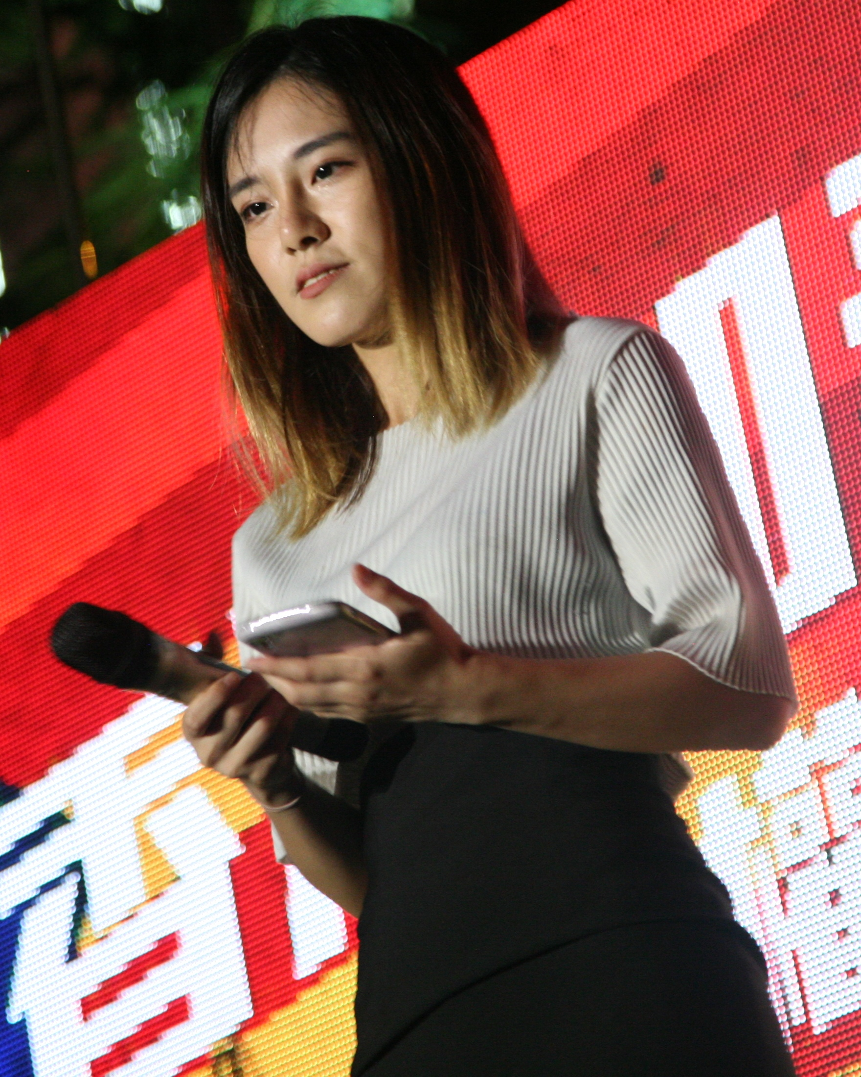 粵語: 黃子悅喺香港加泰人權自由集會。